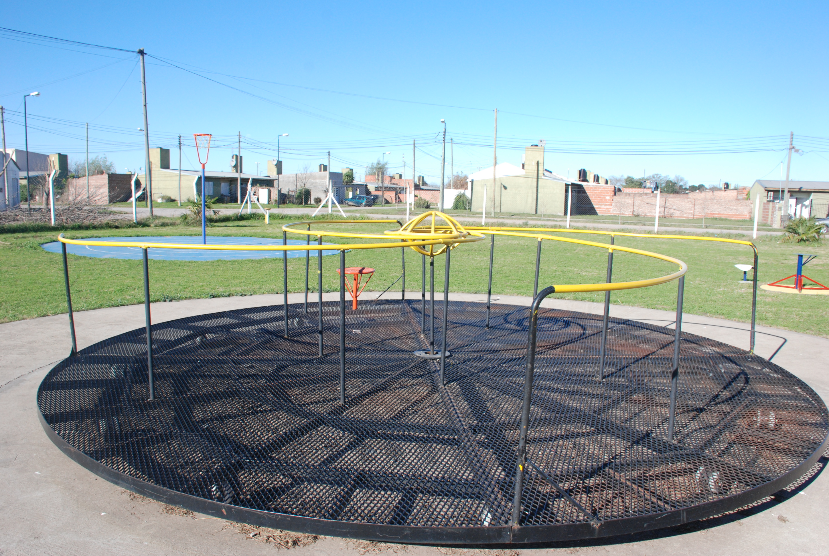 Calesita de la vía láctea del Parque Cielos del Sur, Chivilcoy, provincia de Buenos Aires.